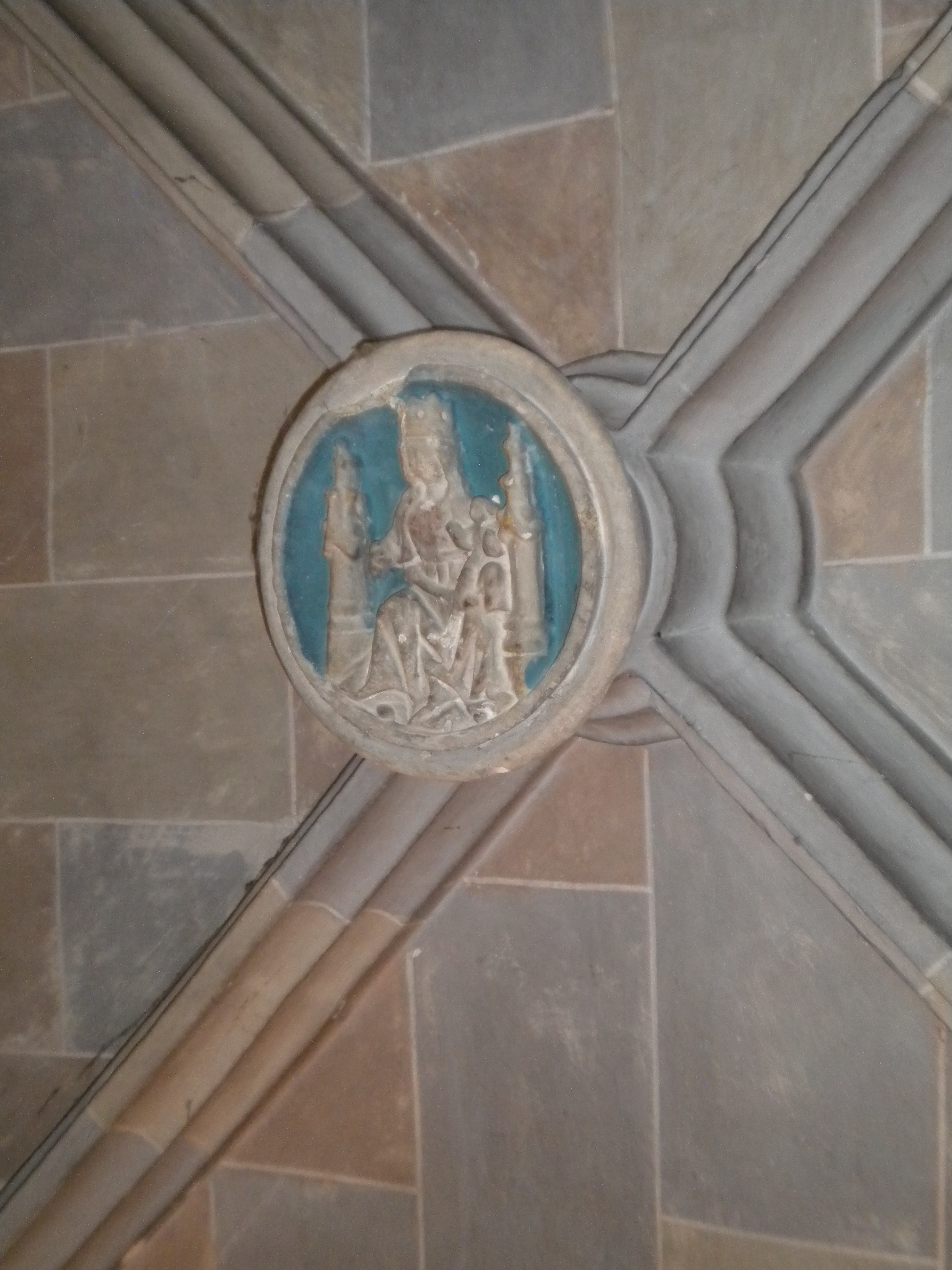 Rosetó en clar de volta de la Verge de l'Heura situada en l'entrada de ponent de l'esglesiola